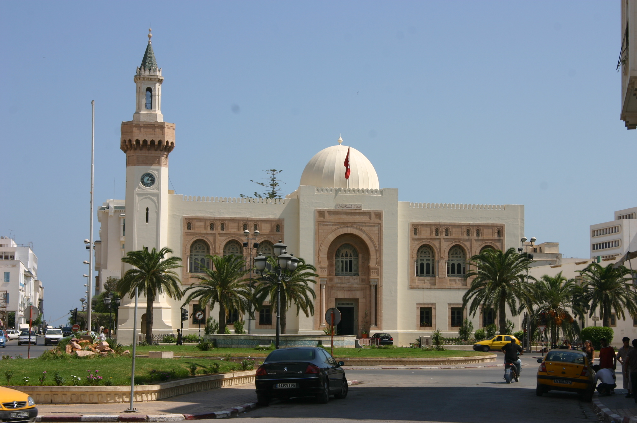 Photo perso août 2007 représentant l'hôtel de ville de Sfax (Tunisie).